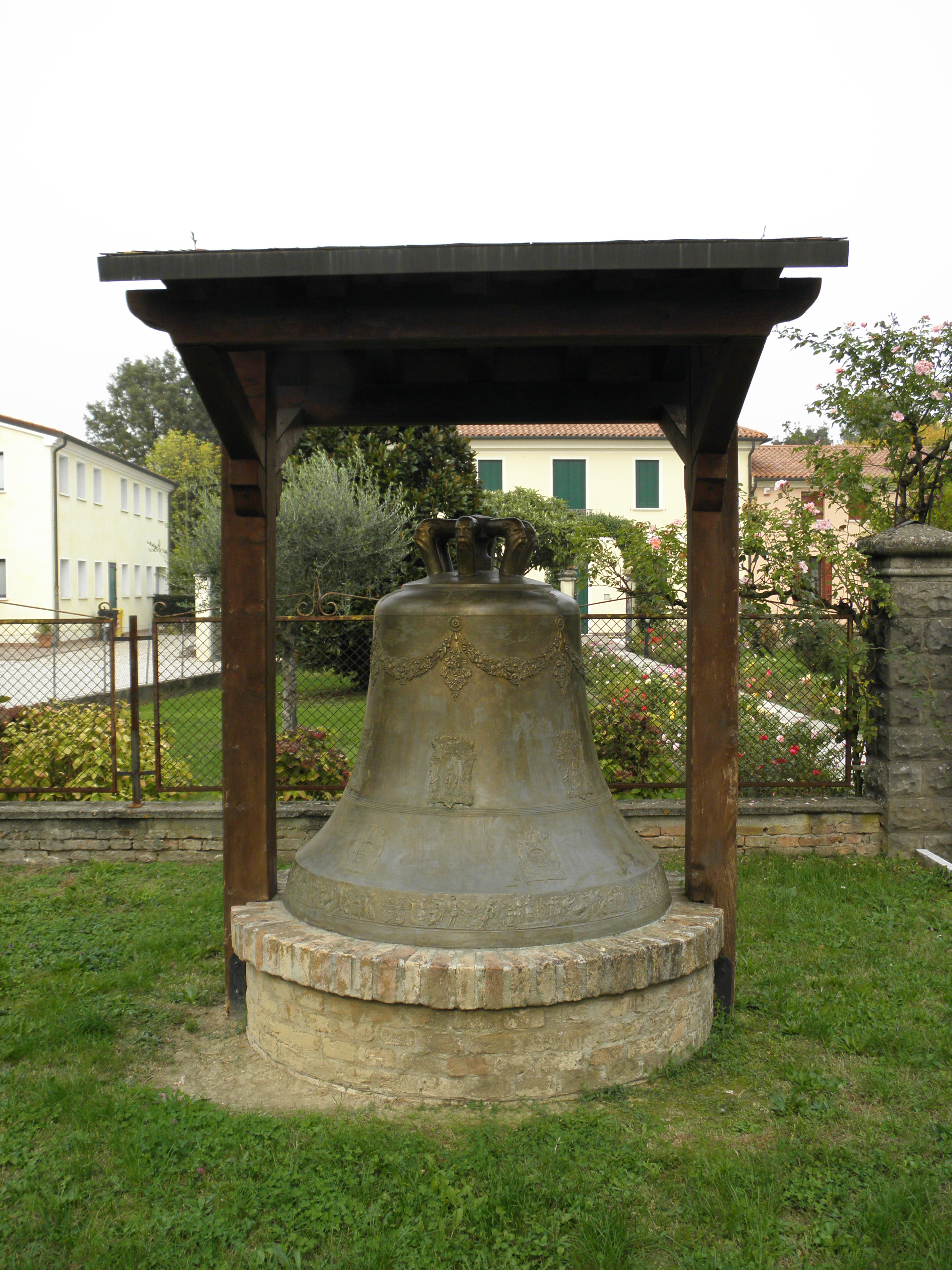 Scaltenigo, frazione di Mirano: la campana posta davanti alla canonica della chiesa arcipretale della Cattedra di San Pietro Apostolo.